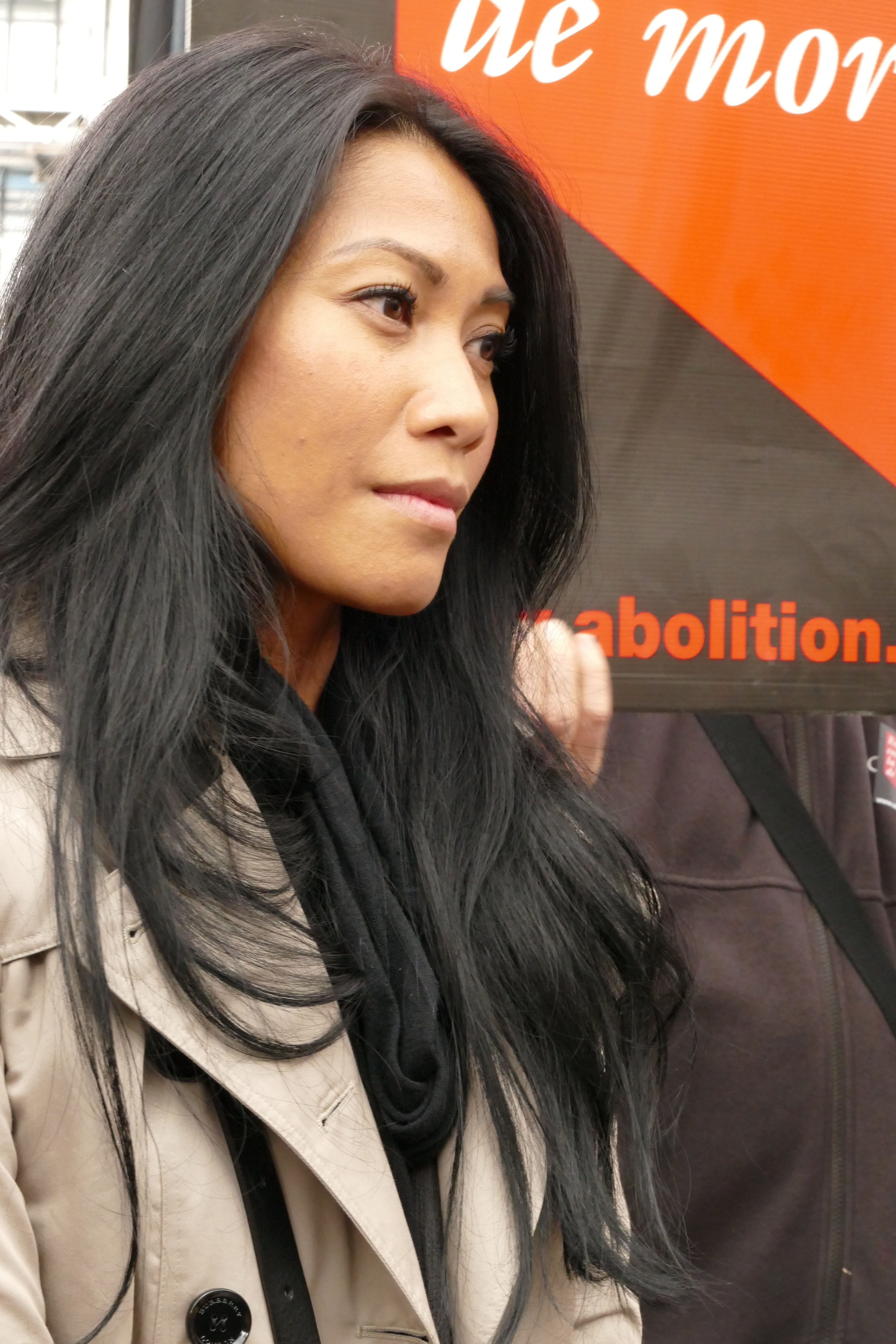 Manifestation de soutien à Serge Atlaoui et contre la peine de mort, le 25 avril 2015 sur la place Edmond-Michelet (Paris, 4e arrond.). La chanteuse Anggun se mobilise pour cette cause.